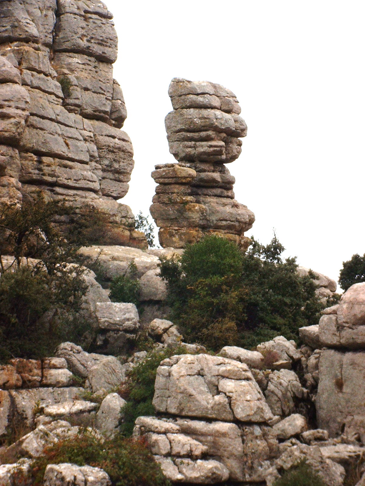 Formaciones cársticas de El Torcal, en Antequera (Málaga)